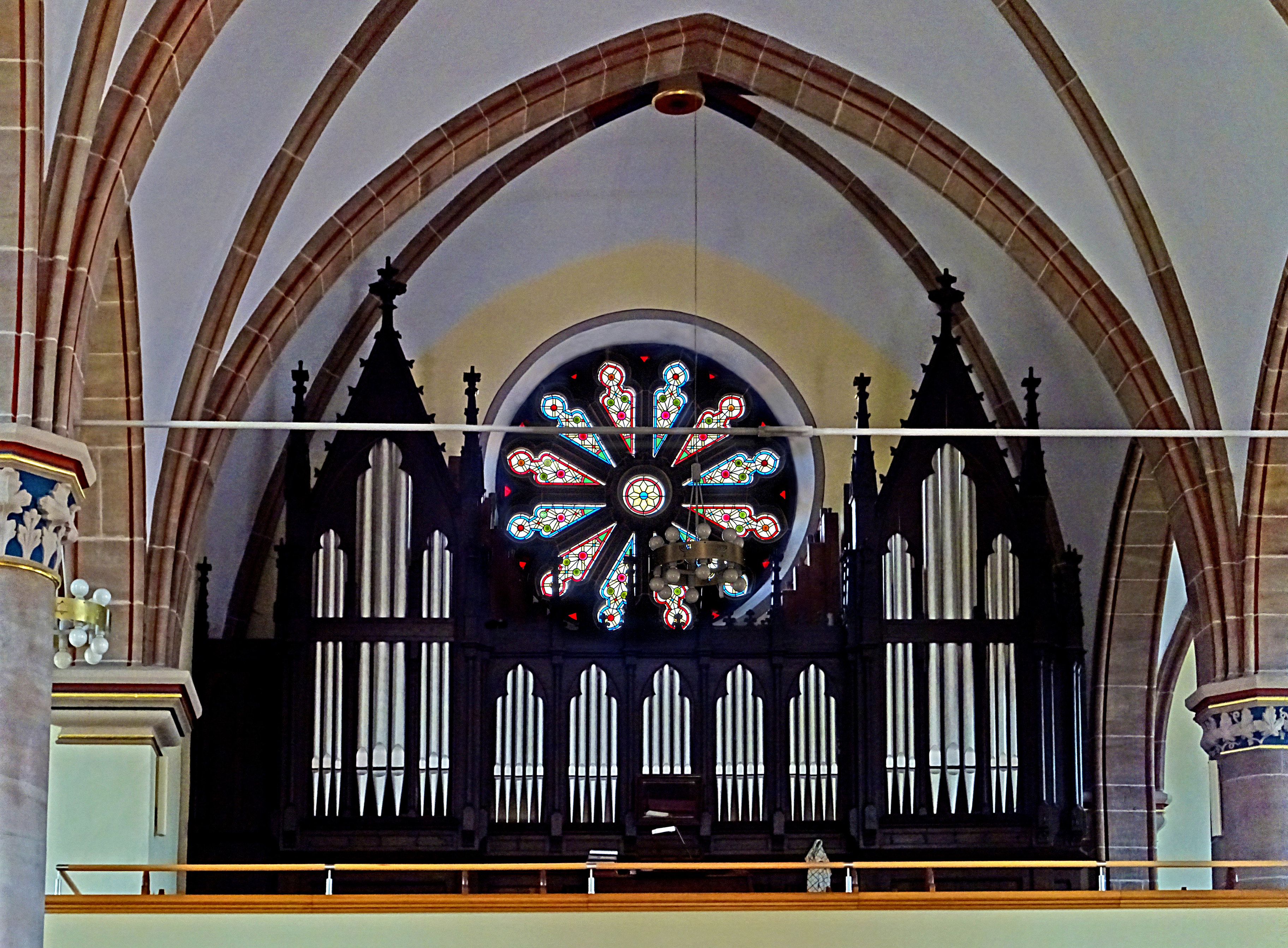 Orgel von Robert Knauf & Sohn (1885) und Wiegand Helfenbein (1935 II/P26) in der Kirche Mariä Geburt (Lengenfeld unterm Stein)[1]